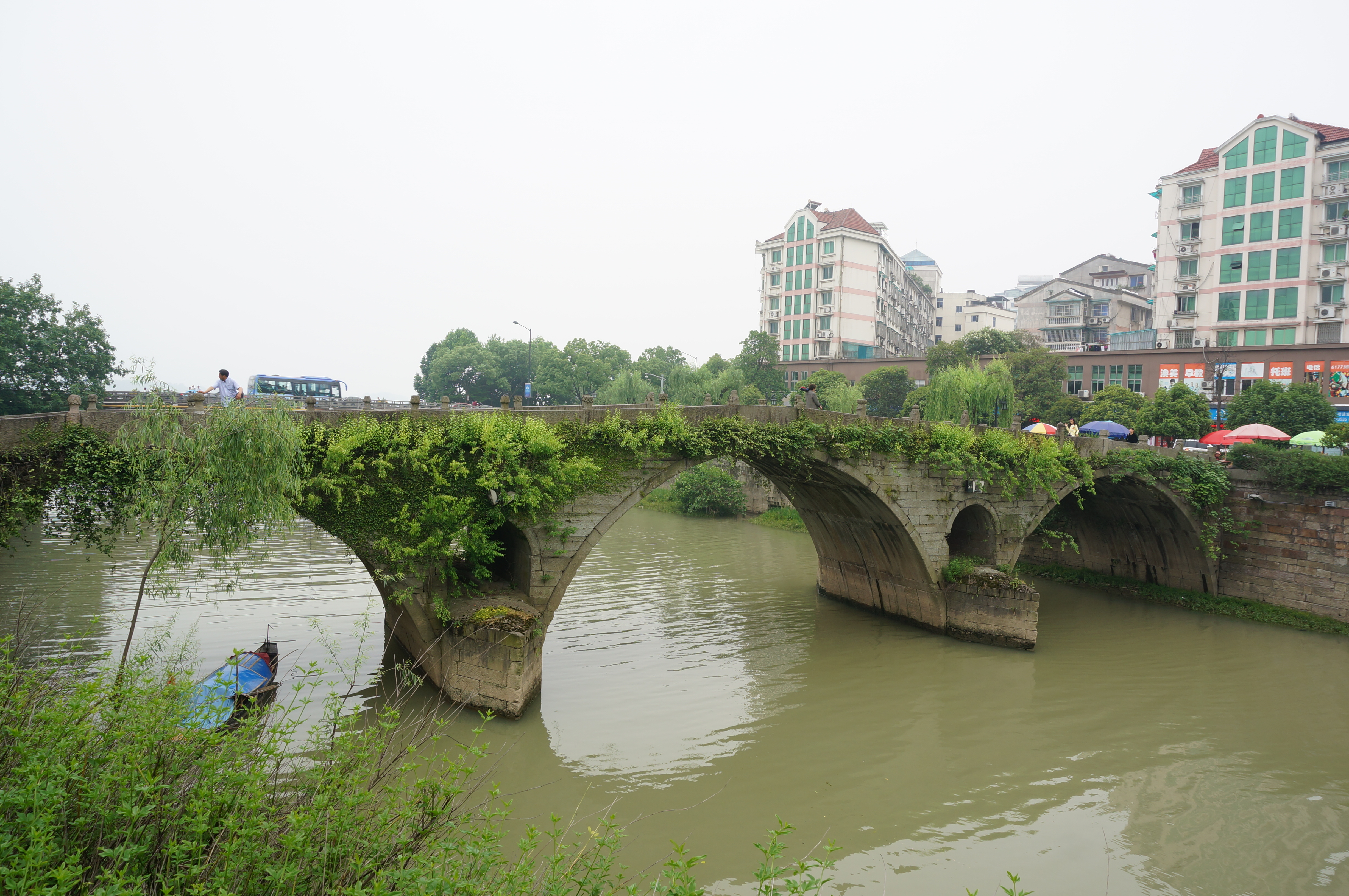 富阳恩波桥，自东北侧看。